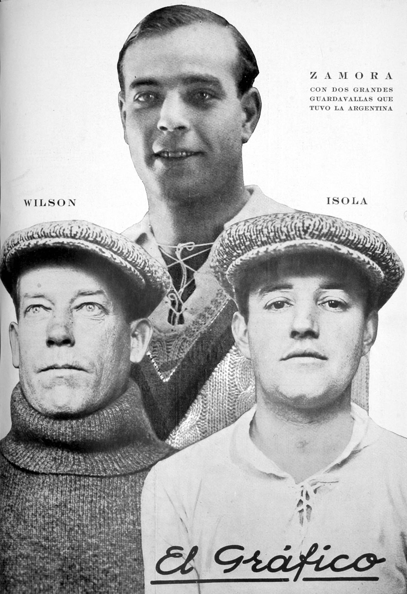 El Grafico del 31 de Julio de 1926. Edicion 369